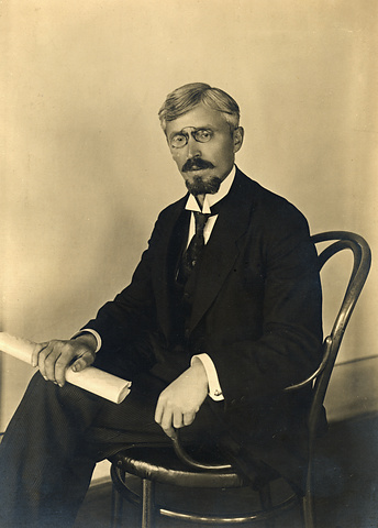 Edward Babák (1873 - 1926), Český fyziolog.